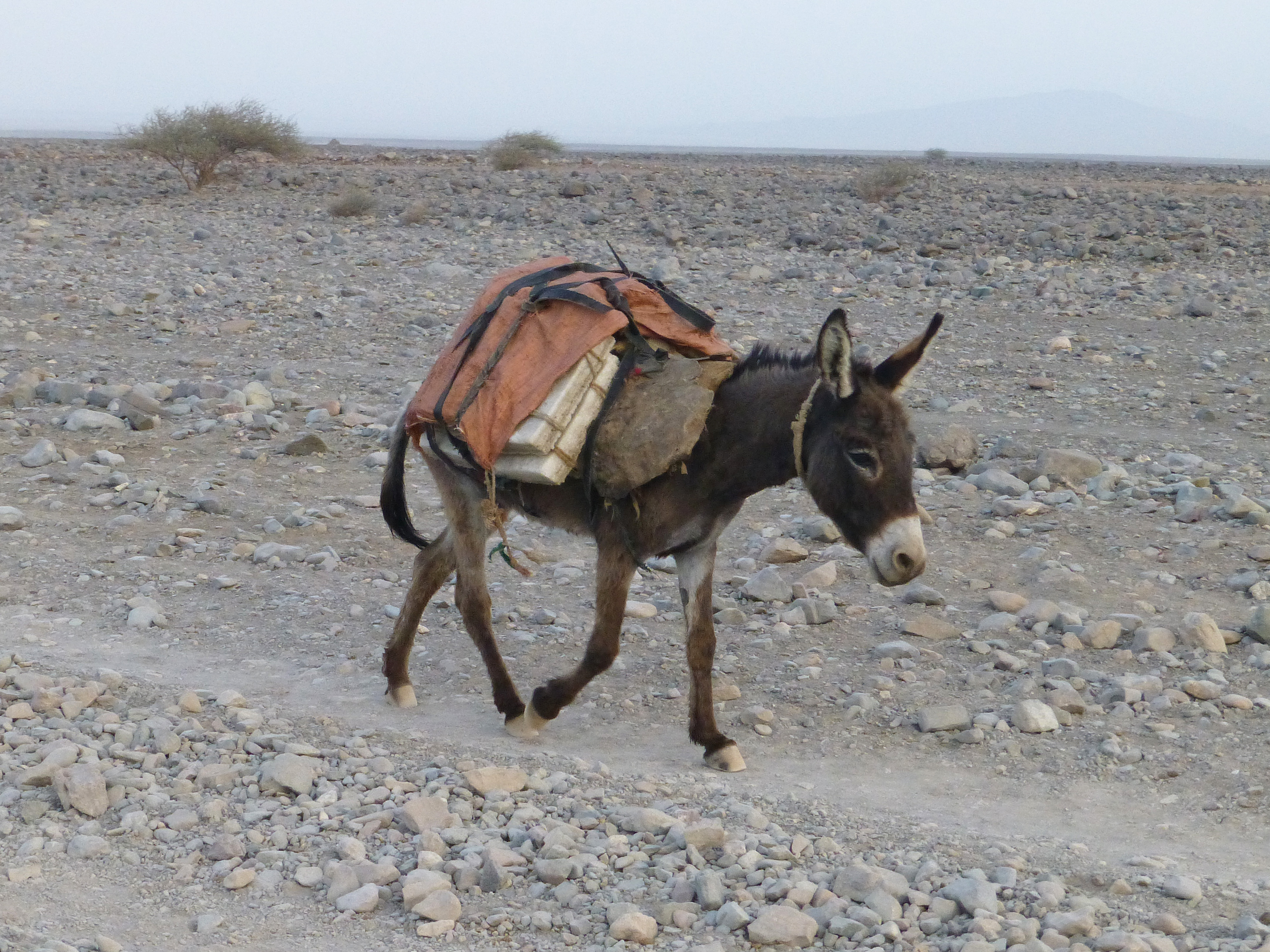 Ethiopie, région Afar, désert Danakil, entre Berhale et Ahmed Ela : caravane de sel